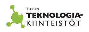 Turun Teknologiakiinteistöt Oy Logo